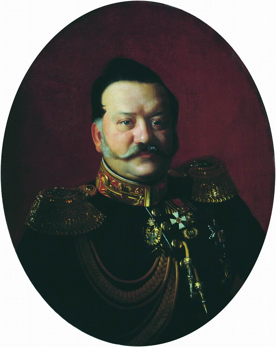 Портрет генерала-лейтенанта Якова Ивановича Ростовцева 1855